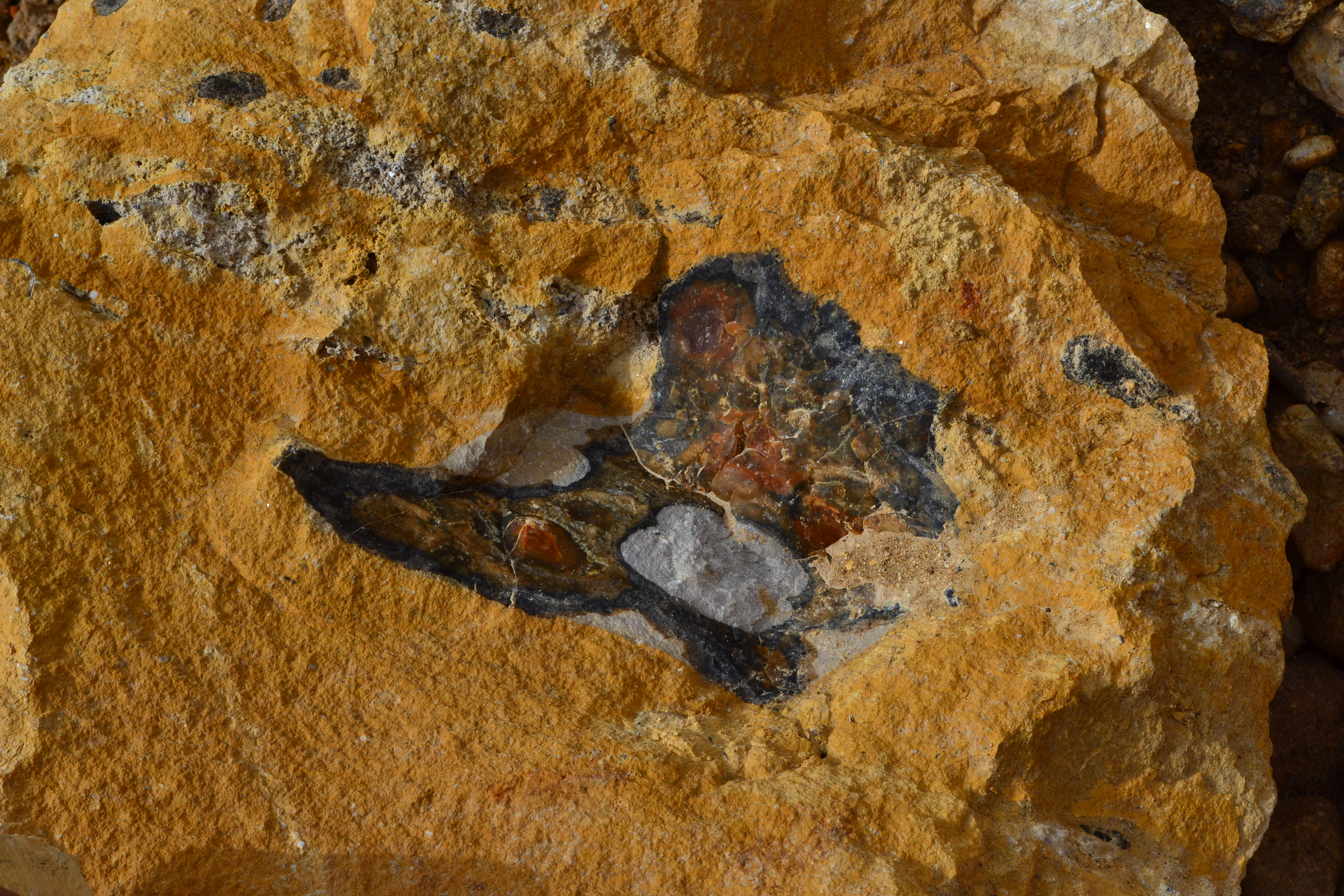 Silicon nodule in limestone